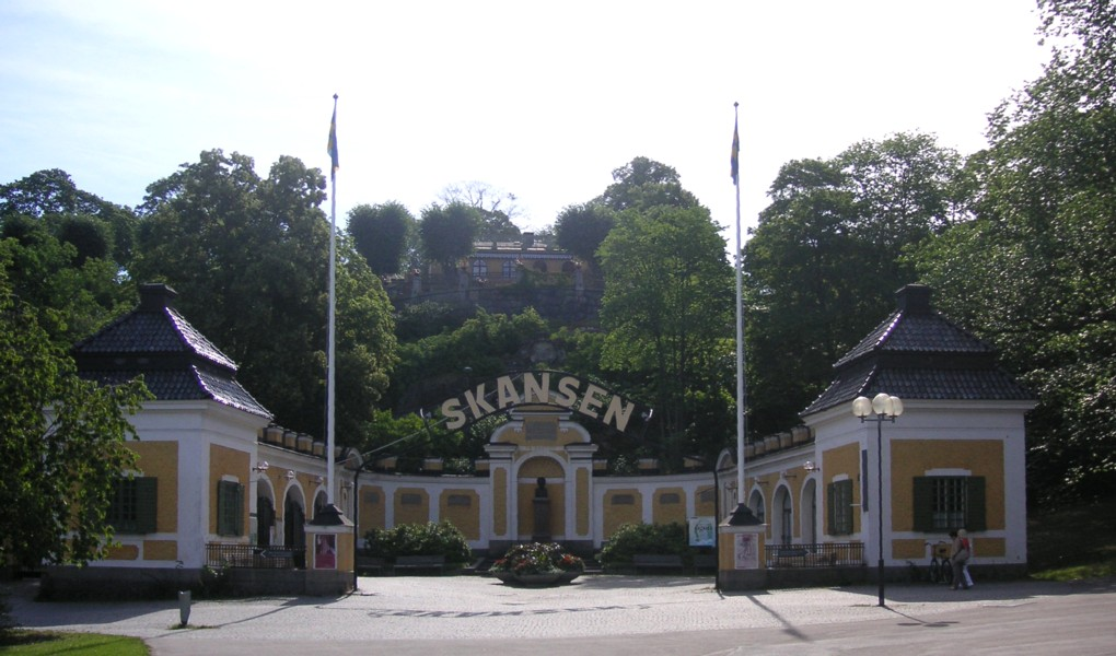 Hazeliusporten. Entrén till Skansen vid Biologiska museet. Invigd 1906. Arkitekt Gustaf Améen.